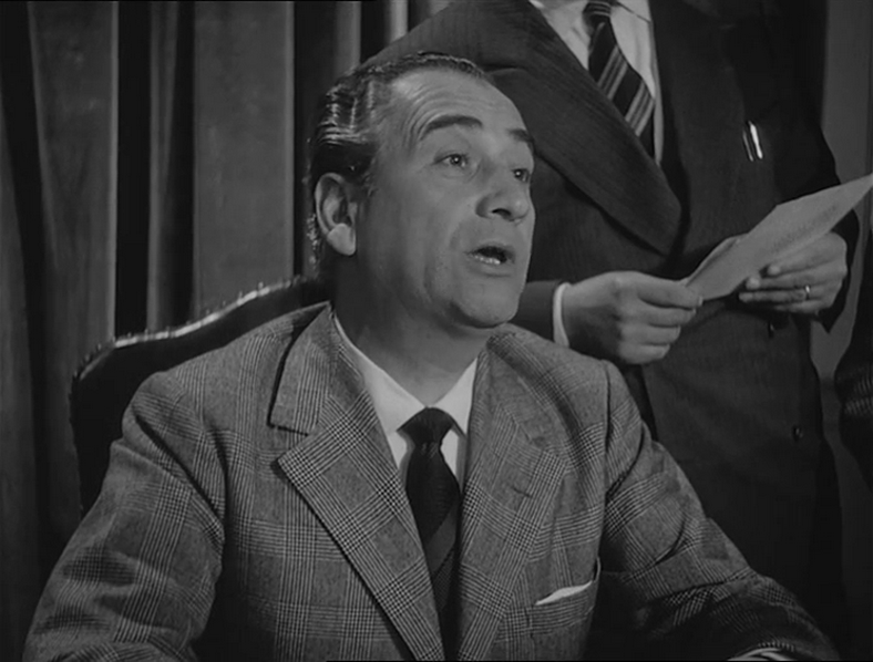 Scena dal film Il viale della speranza